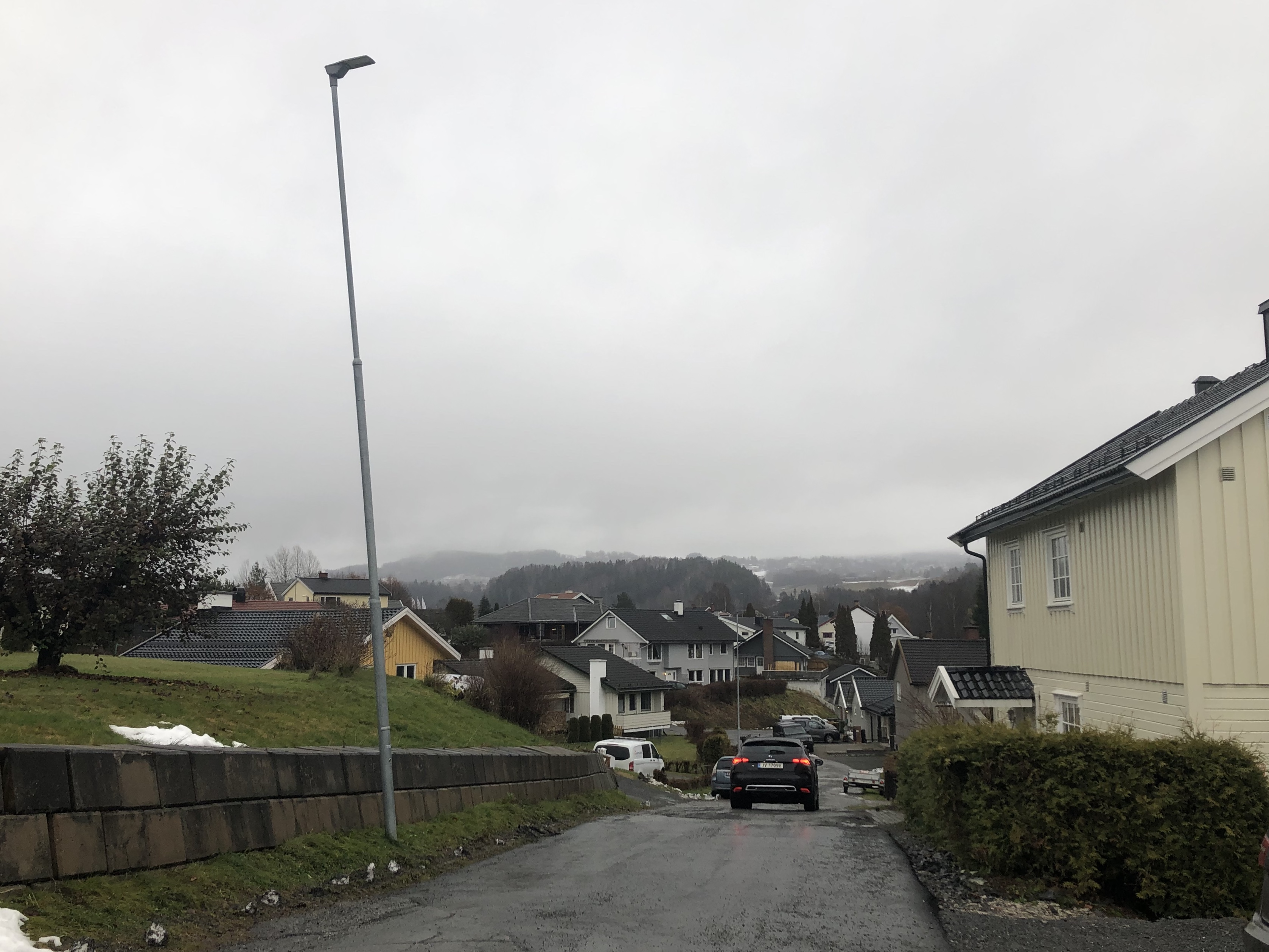 Wahlstrøms gate, Hønefoss